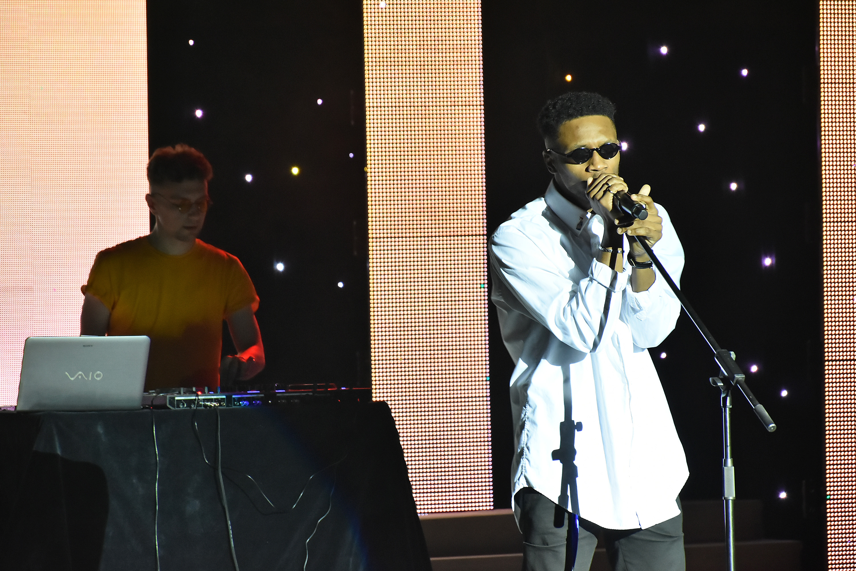 Гурт «Tvorchi» виступає на конкурсі краси «СтудМіс ТДМУ 2019». Тернопільський академічний обласний драматичний театр імені Тараса Шевченка, 4 квітня 2019 року.